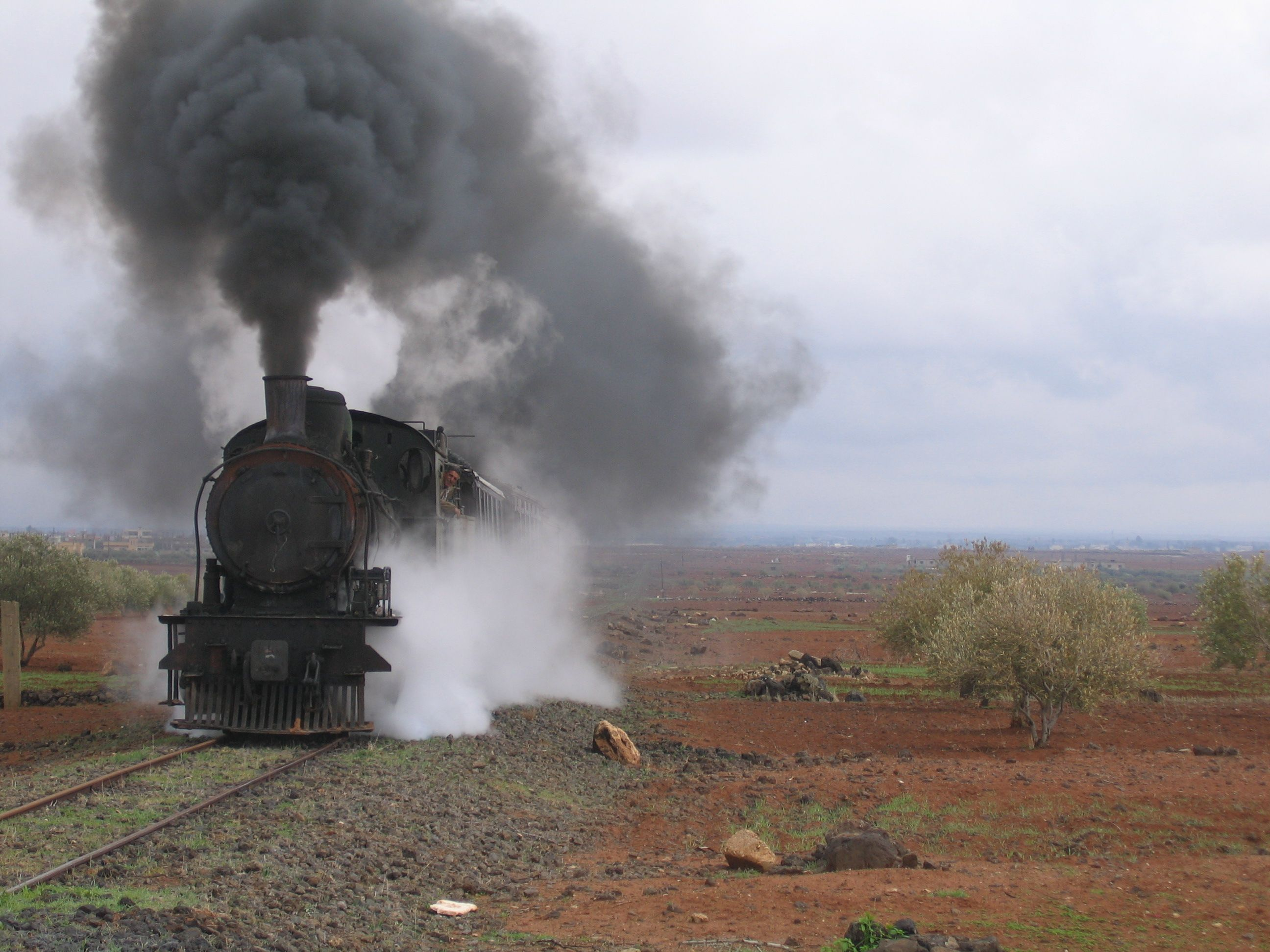 Hedschasbahn, Dampfsonderzug auf der Strecke Bosra-Dar'a, Syrien